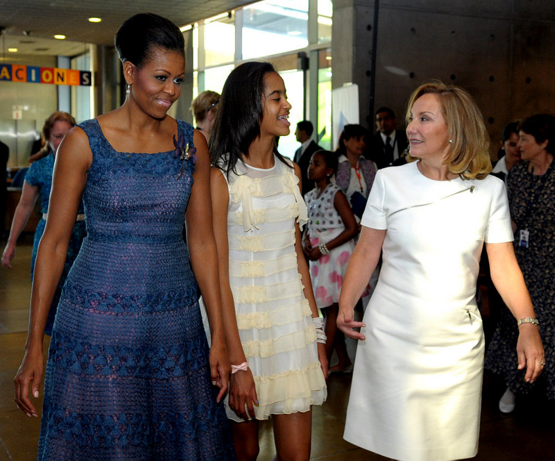 Visita Primeras damas al MIM